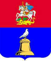 Герб Реутова (1992)